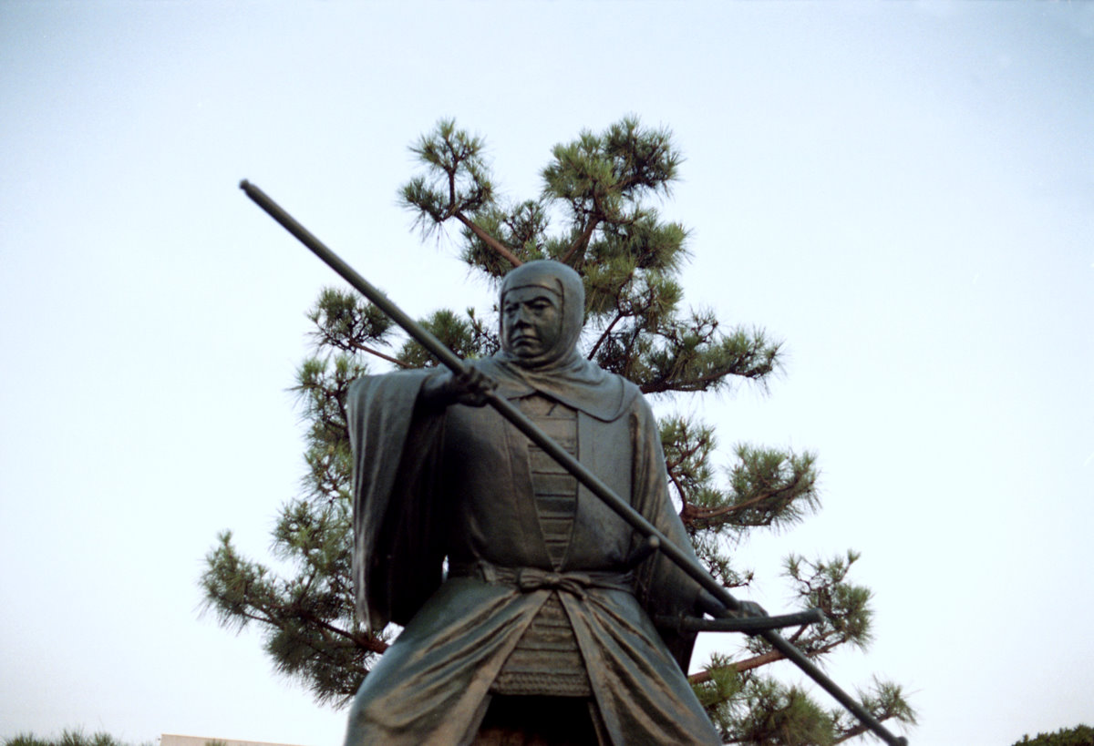 武蔵坊弁慶／田辺市